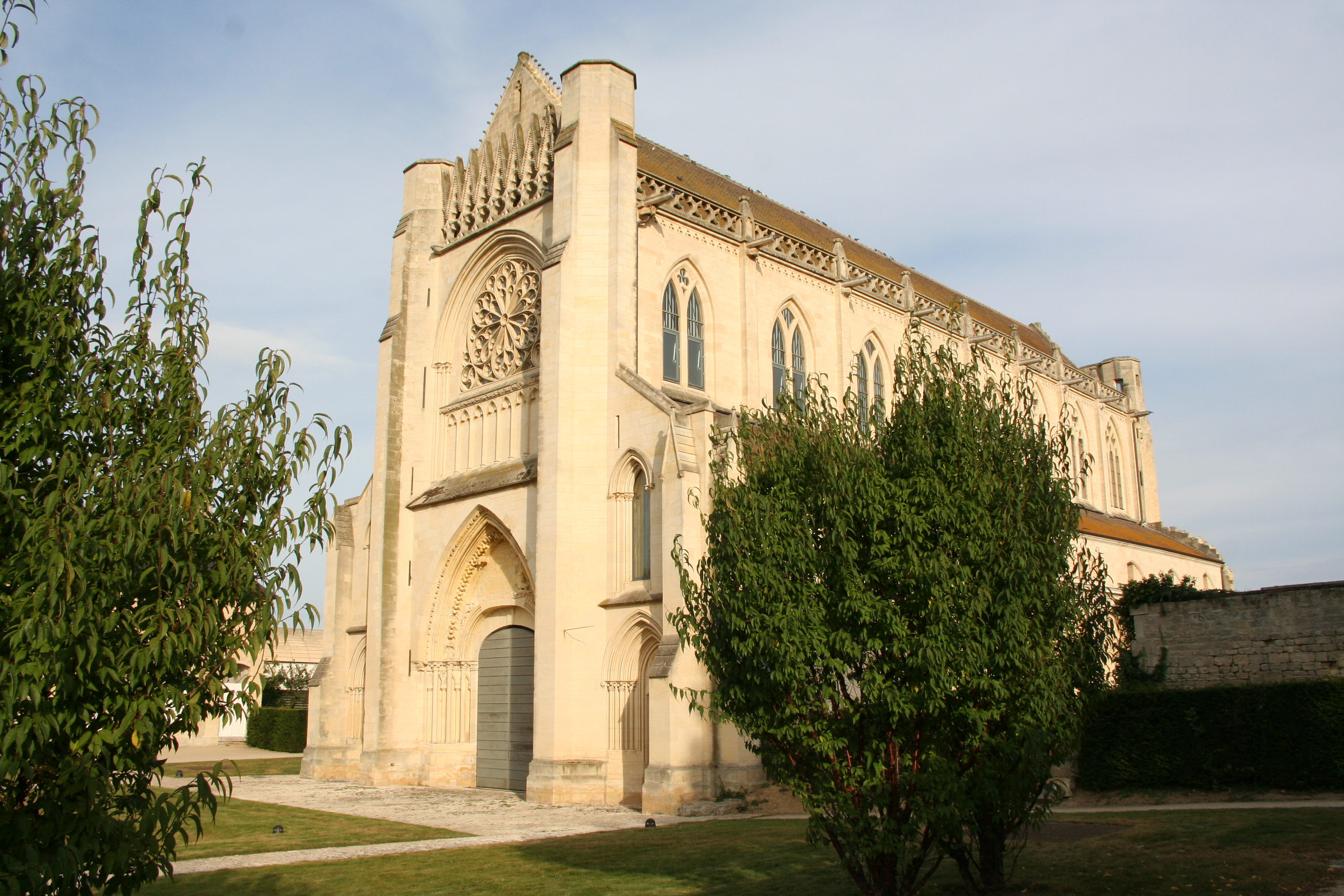 Saint-Germain-la-Blanche-Herbe (Calvados, France), ancienne abbaye d'Ardenne classée M.H..